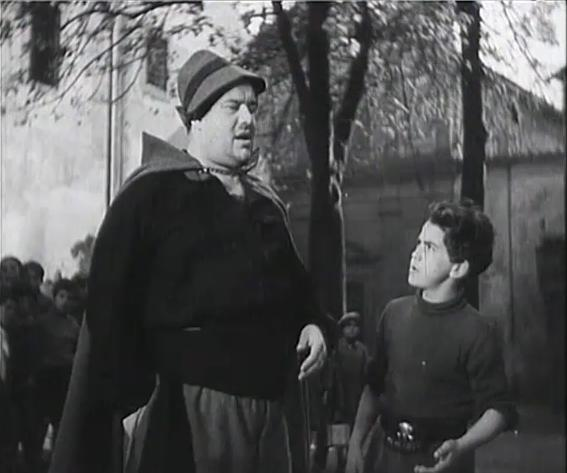 Screenshot del film Vecchia guardia (1934)